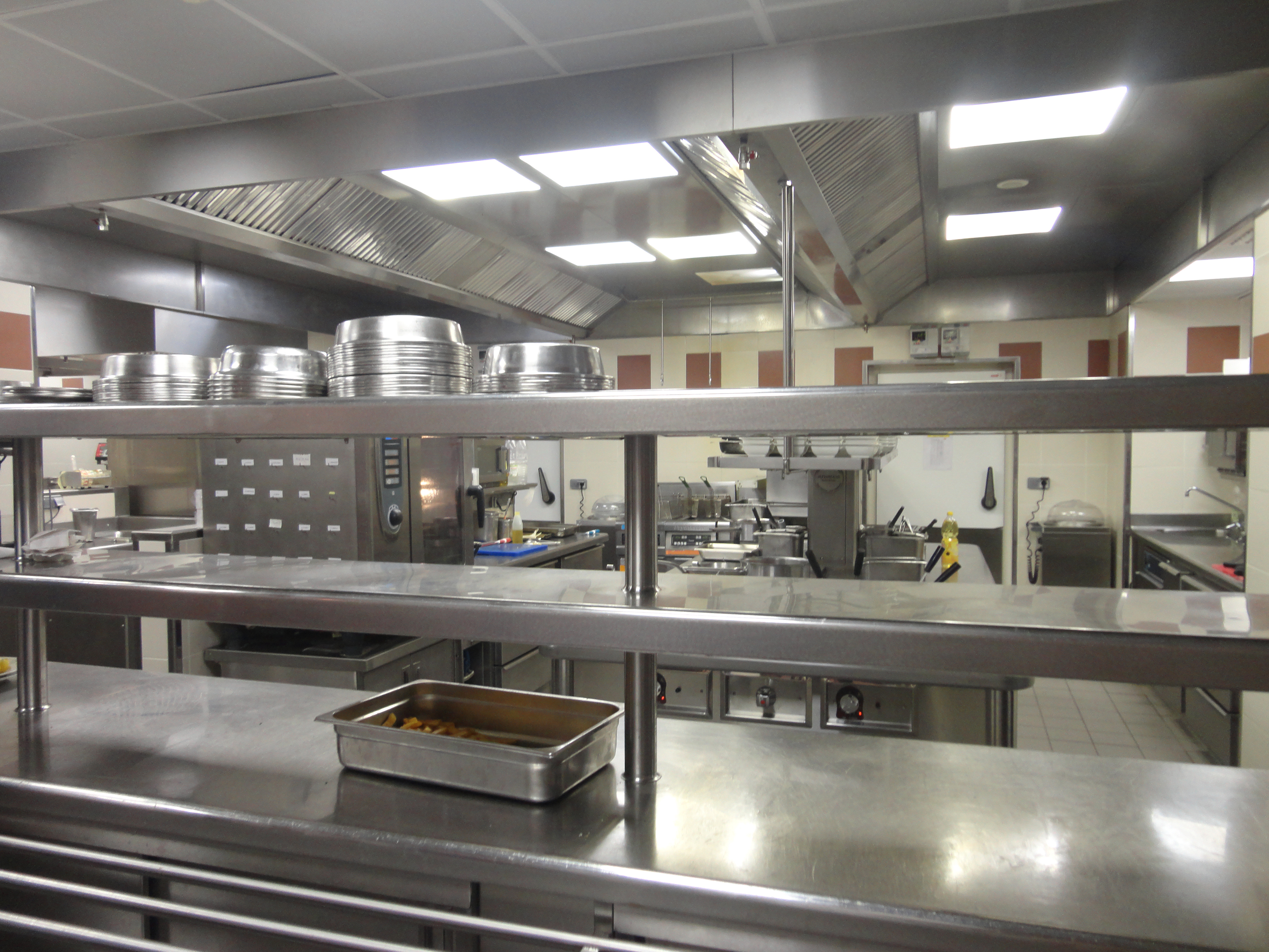 Cuisines de la Brasserie Georges à Lyon (France).